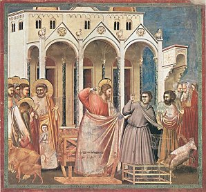 Titel: Christus vertreibt die Händler aus dem Tempel (gemalt in Fresko in Padua)